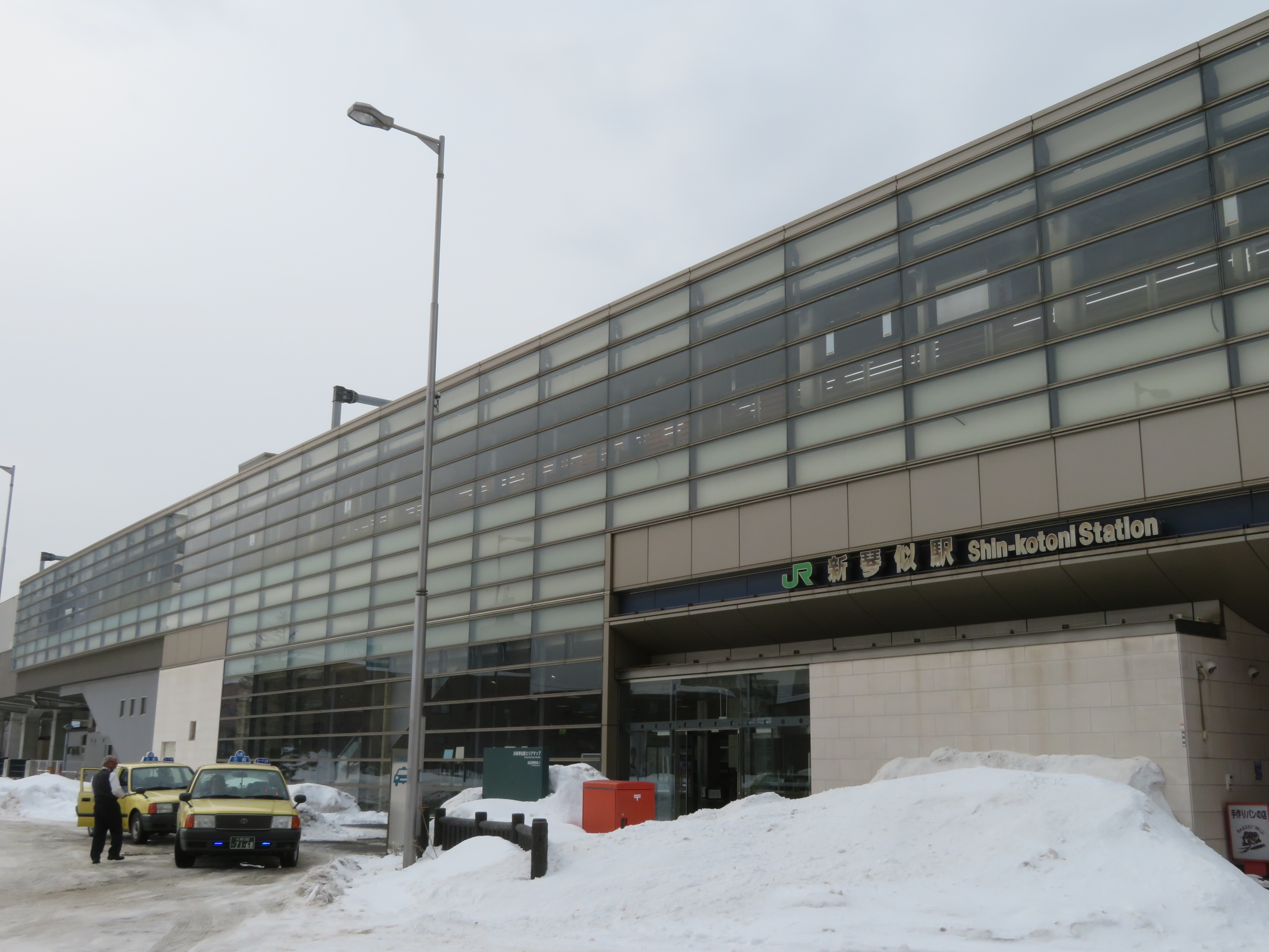 新琴似駅駅舎 Canon PowerShot SX720 HS